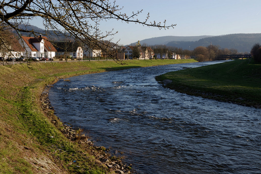 [de:] Die Murg bei Gaggenau-Hörden; [en:] River Murg